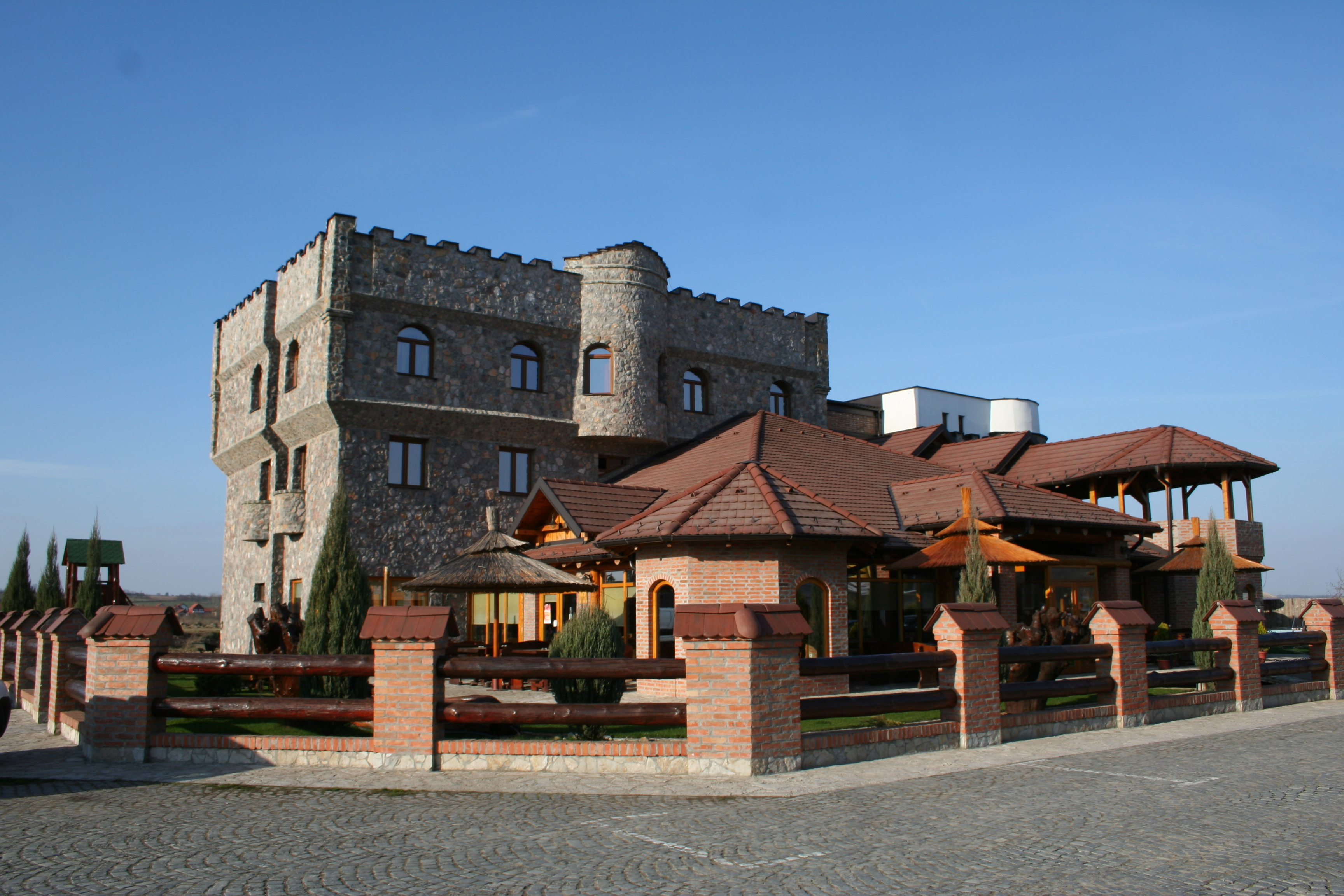 Koceljeva Zamak